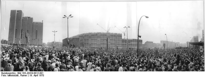 Zentralbild-Mittelstädt-19.4.70-Berlin: Großkundgebung zu Ehren des 100.Geburtstages von W.I.Lenin-Einweihung des Leninplatzes mit Enthüllung des Leninmonuments am 19.4.1970.Zehntausende Einwohner der Hauptstadt der DDR bekundeten ihre Treue zum Sozialismus, indem sie den genialen Führer der internationalen Arbeiterklasse und Begründer des Sowjetstaates am Leninplatz ehrten. Panorama 3 Teile